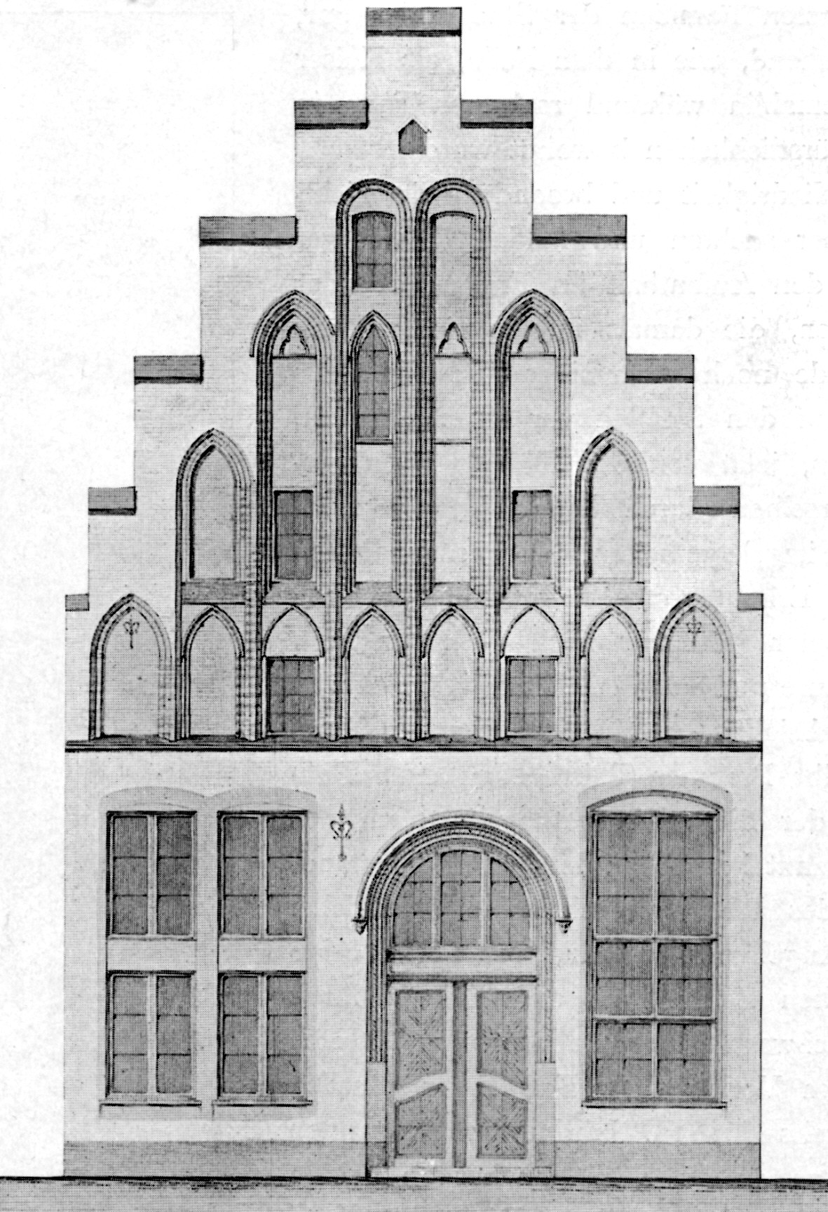 Lübecker Haus des 16. Jahrhunderts, Hüxstraße Nr. 7 (1861 abgerissen)